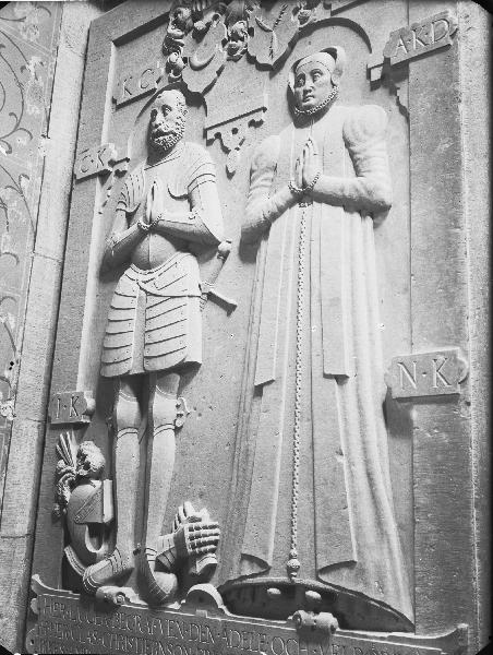 Gravsten över Klas Kristersson Horn och hans hustru Kerstin Krumme. Kategori: (09) Gravar Gravsten över Klas Kristersson Horn och hans hustru Kerstin Krumme.